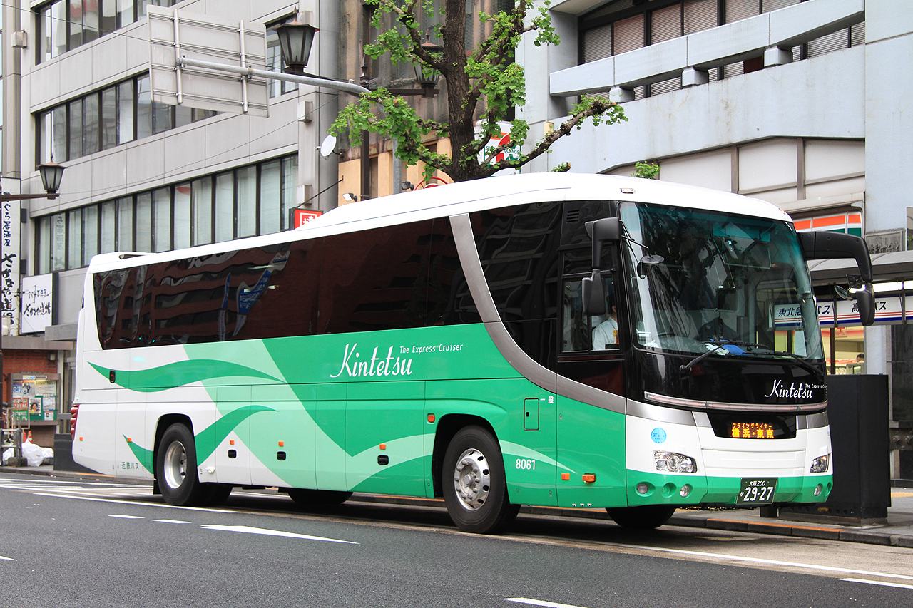 登録番号 大阪200か29-27 近鉄バス㈱八尾営業所所属 車番8061 夜行高速路線用車両 2011年5月 東京駅八重洲口にて撮影 撮影者 Zondag2000